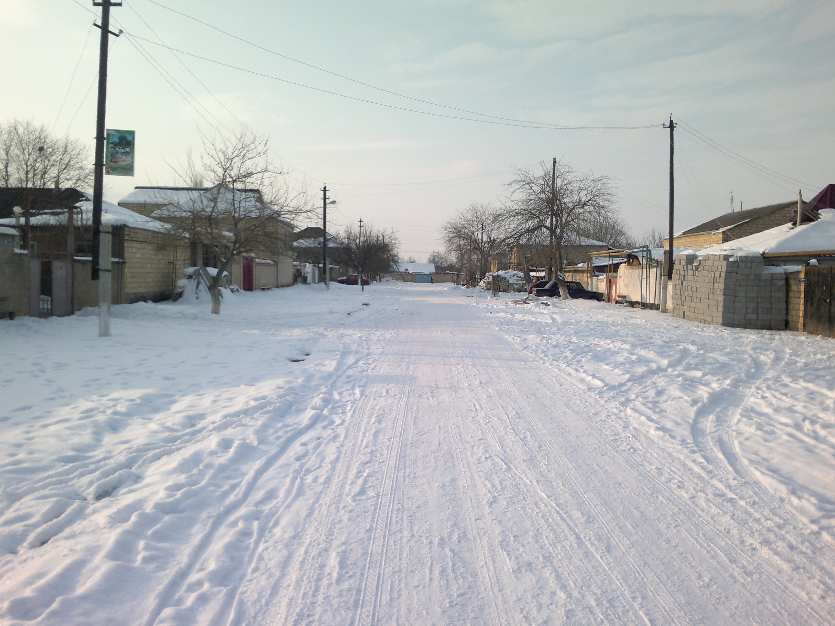 Улица Гусаева в феврале 2012 года